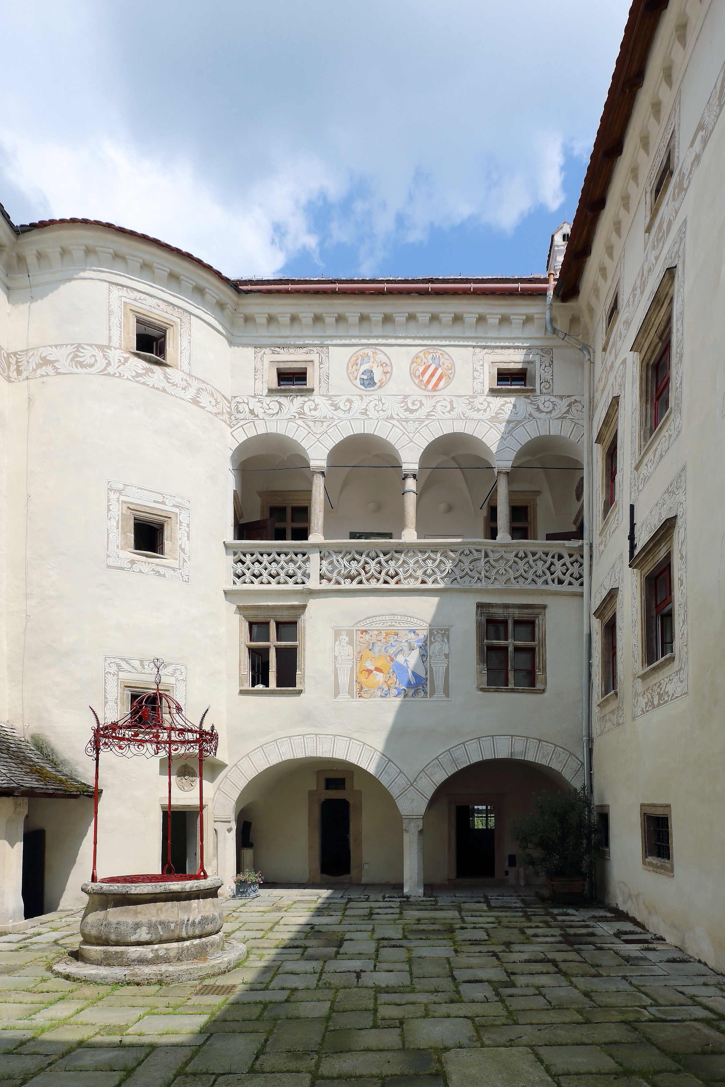 Innenhof des Breiteneicher Renaissanceschlosses in der niederösterreichischen Bezirkshauptstadt Horn.